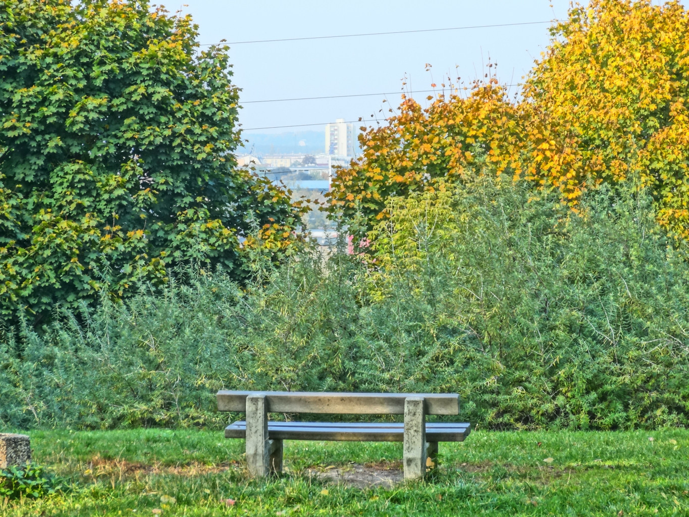 Park na Wzgórzu Wolności w Bydgoszczy